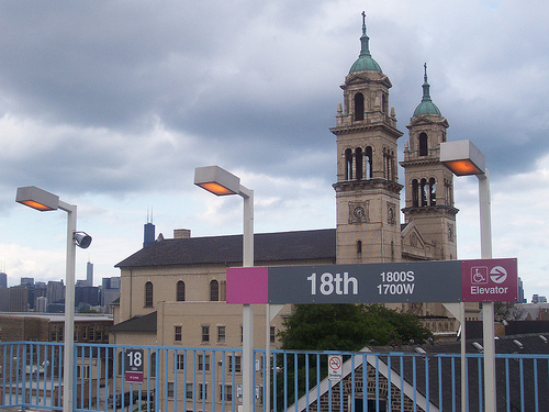 Station 18th sur la rose